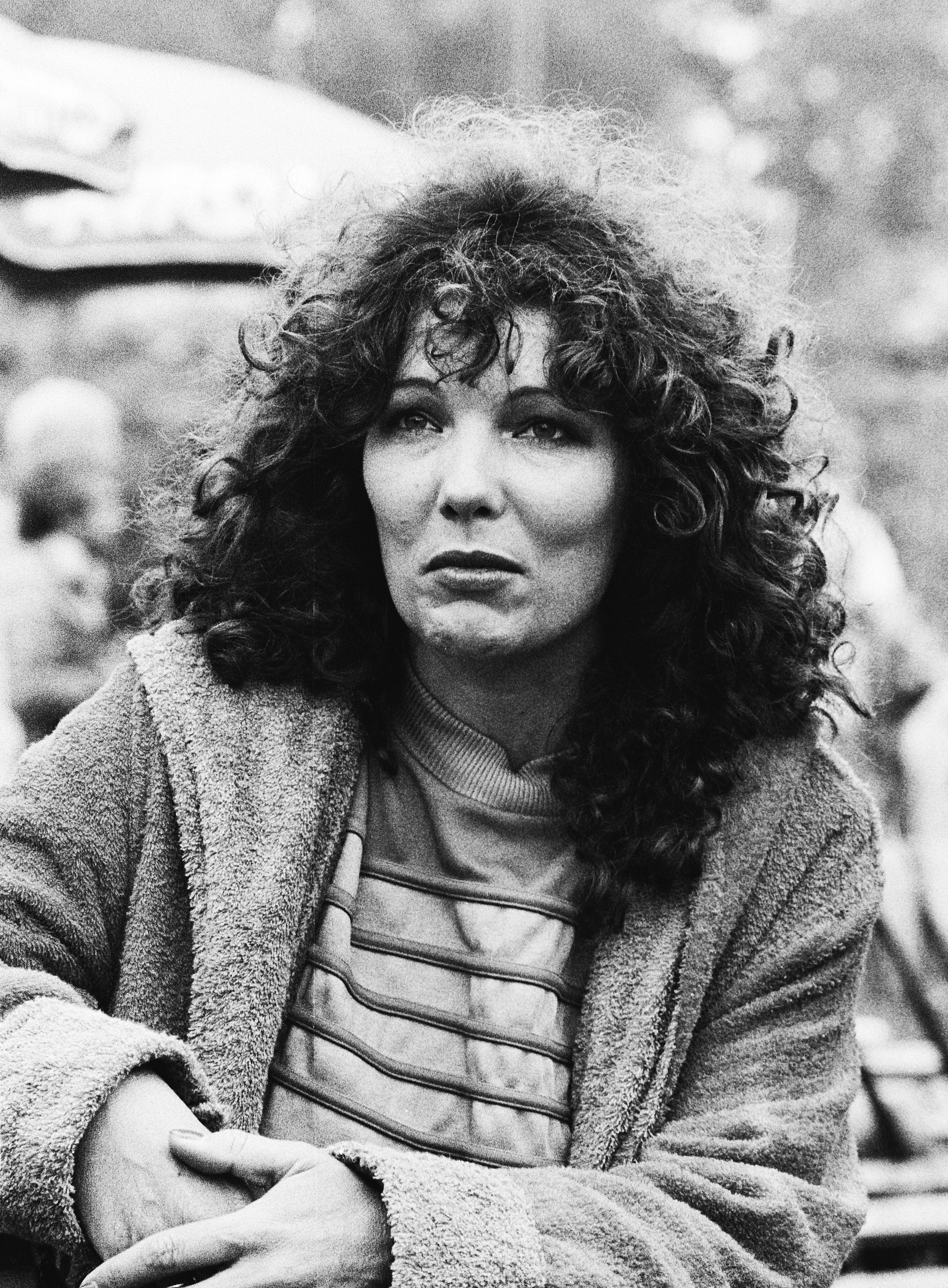 Opnamen AVRO-TV "Sterrenslag" in Enschede. Willeke van Ammelrooy